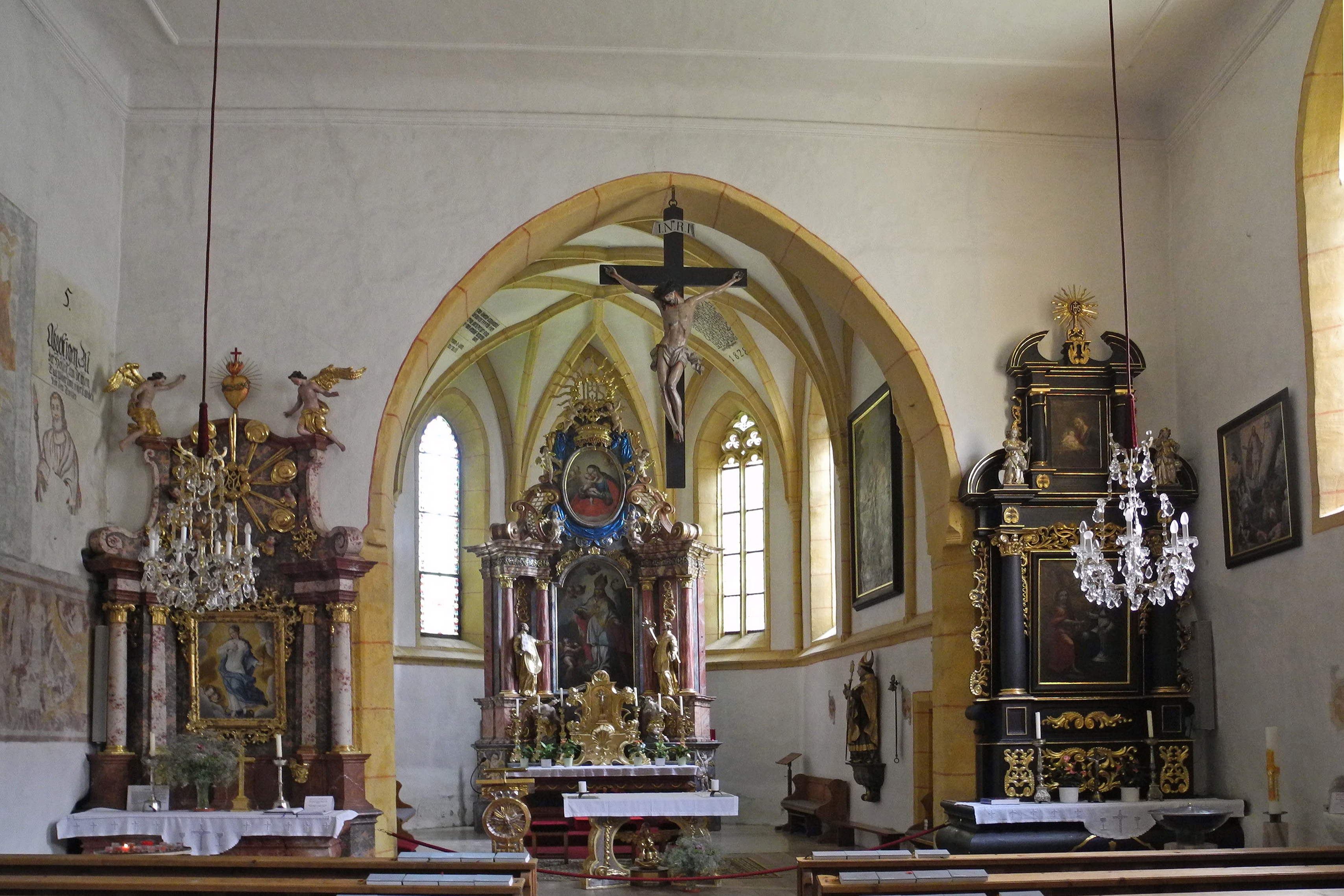 Innenraum der kathol. Pfarrkirche St. Rupert in Ramsau-Kulm